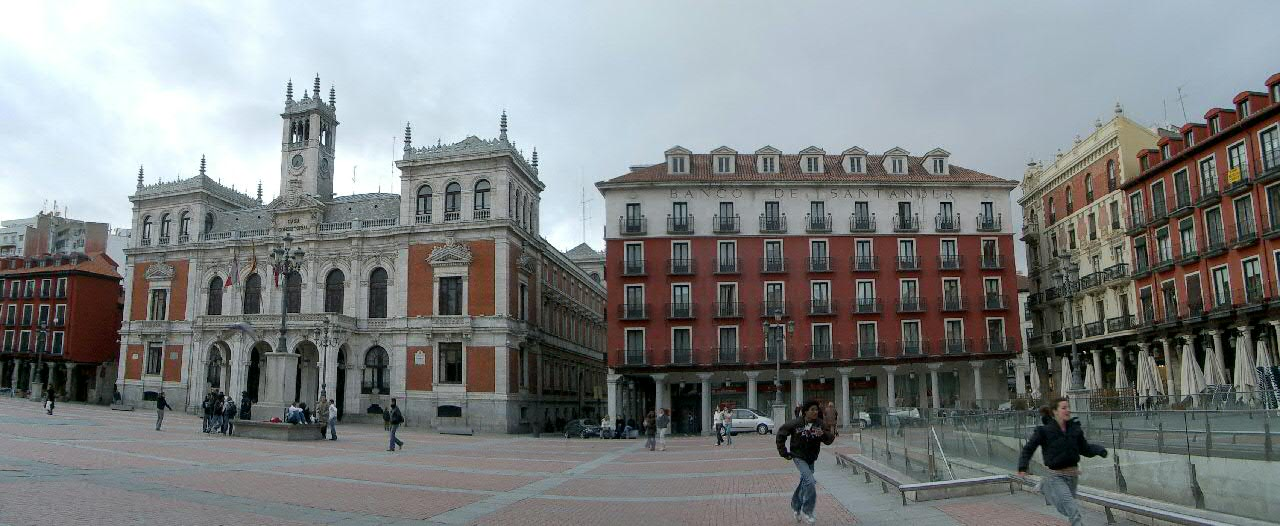 Vista panorámica del Ayuntamiento de Valladolid, con el edificio del Banco de Santander a la derecha recientemente adquirido por el grupo propietario de Zara (Inditex). El Ayuntamiento no, el edificio del Banco ;-)